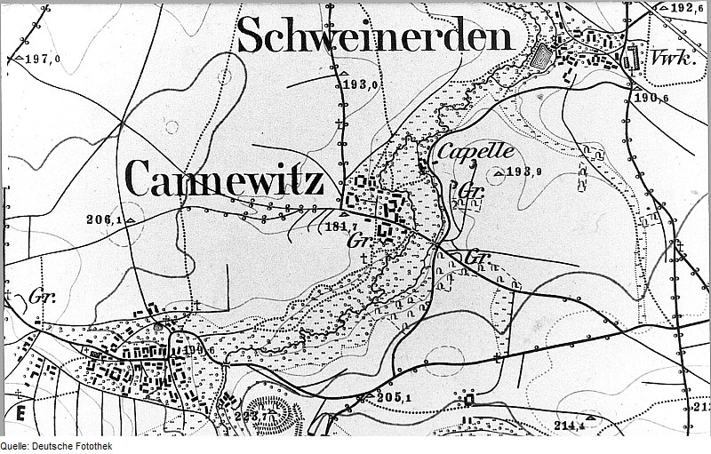 Original image description from the Deutsche Fotothek Panschwitz-Kuckau-Cannewitz. Meßtischblatt, Sekt. Kloster Marienstern, 1884